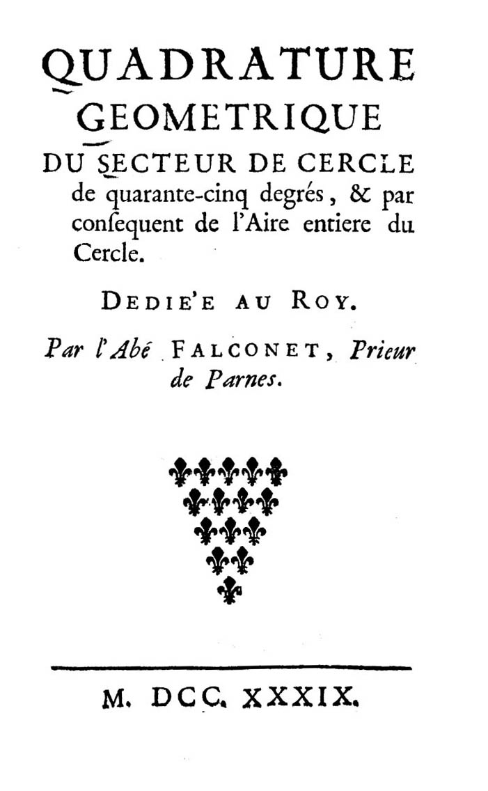 Quadrature geometrique du secteur de cercle de quarante-cinq degres, & par consequent de l'Aire entiere du Cercle ... Par ... Falconet .. - [S.l.] : [s.n.], 1739. - [4], XII, 38, [2] p., 7 c. di tav. : ill. ; 8º .